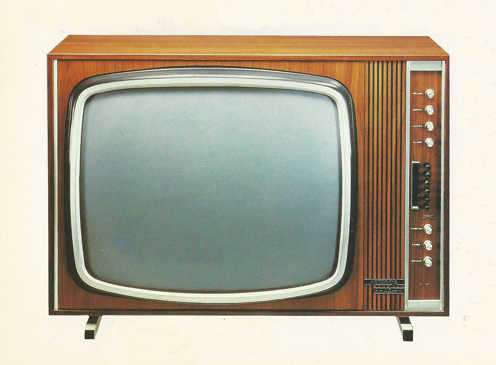 il TVC Autoxox 2589